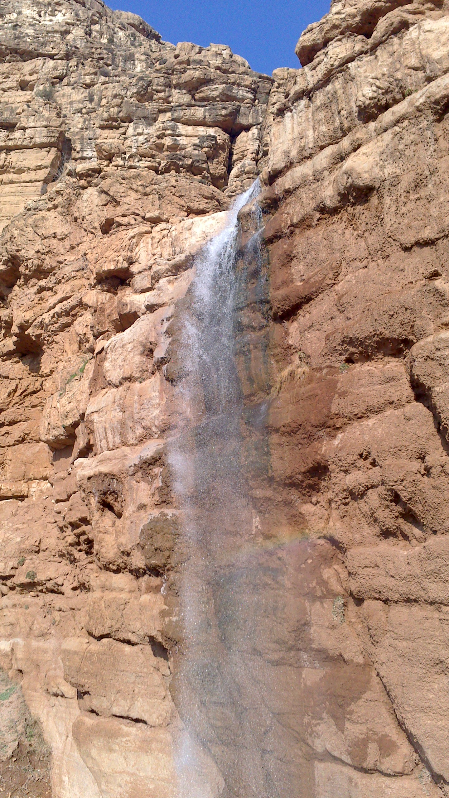 آبشار آبتاف پلدختر